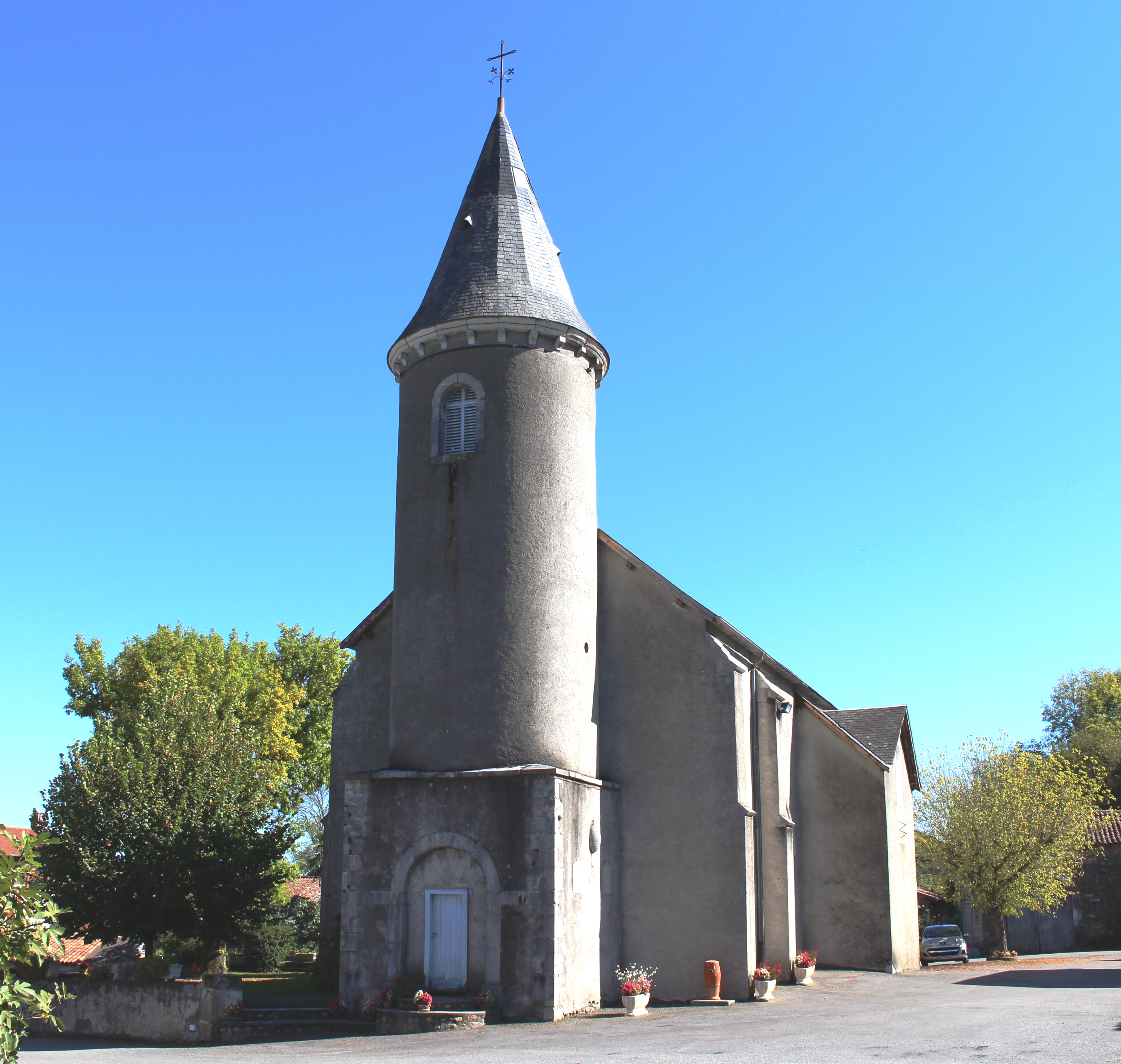 Église Saint-André de Montégut (Hautes-Pyrénées)